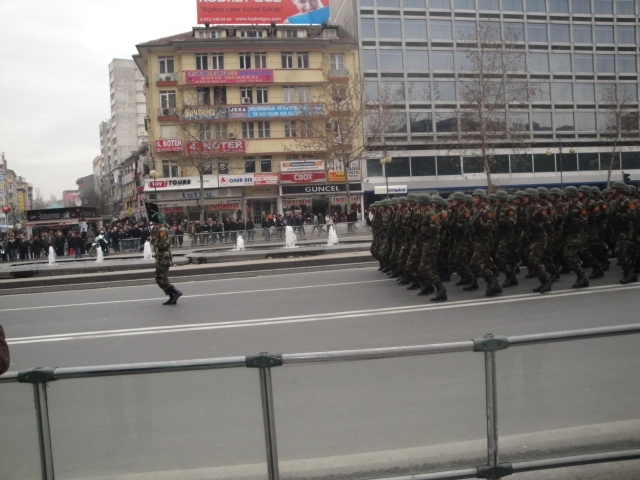 Gazi Mustafa Kemal Atatürk'ün başkent Ankara'ya teşrifleri anısına geleneksel olarak her yıl 27 Aralık tarihinde, Kara Harp Okulu sorumluluğunda Harbiyelilerin gerçekleştirdiği Atatürk Garnizon Koşusu'ndan bir görünüm.